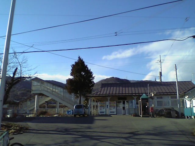 稲荷山駅の全景